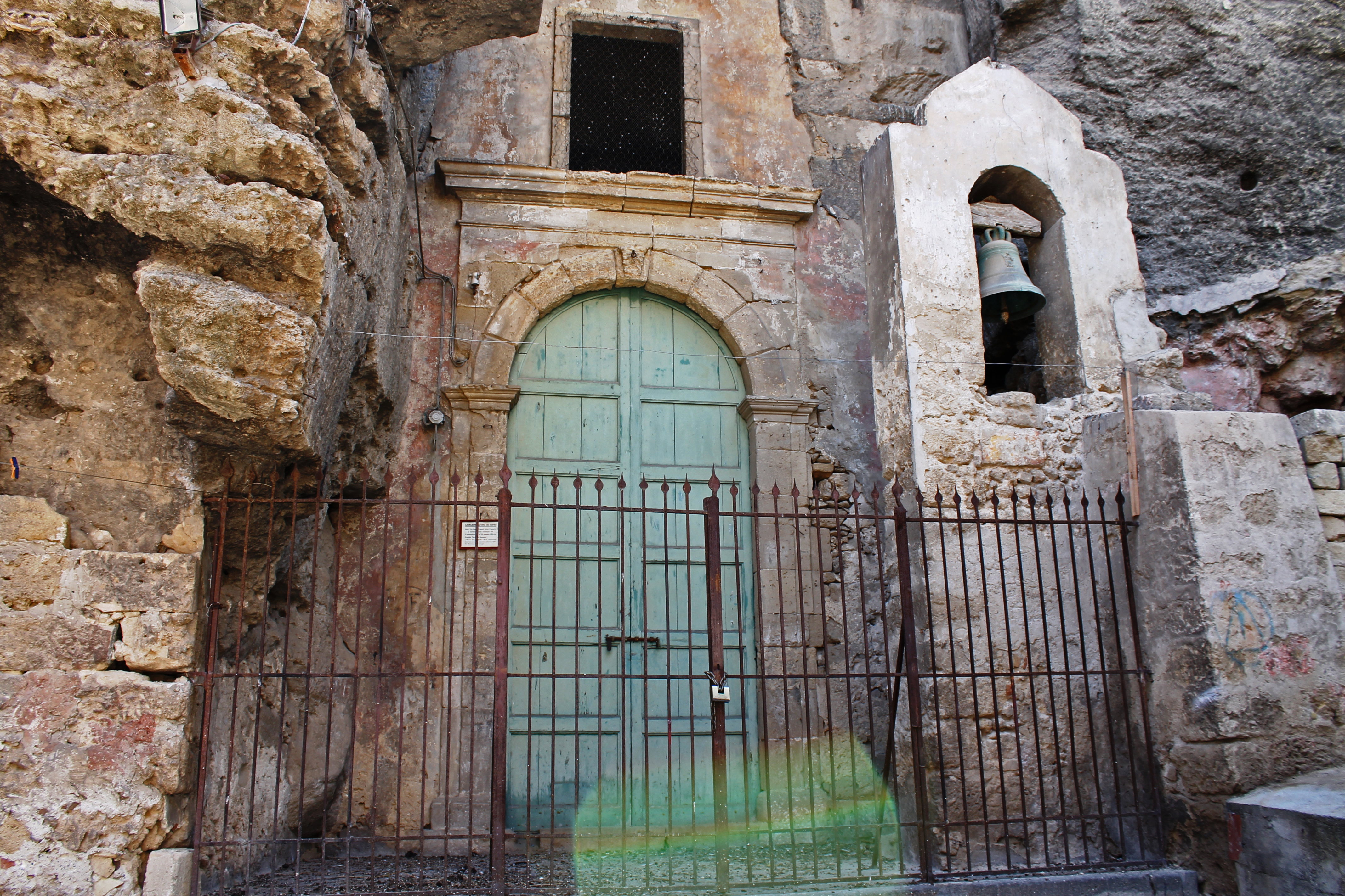 La Chiesa del Sacro Carcere dei Tre Santi è un luogo molto importante per il culto legato ai "Tre Martiri di Lentini". Essa si trova presso la Via Paradiso( di preciso in "Vicolo tre santi"). Questa chiesa è nota come: "Grotta dei Santi", "Chiesa di San Giuliano Spadaliere Patrono dei Viandanti" e con i nomi siciliani di "Rutta , Rattatullu", cioè "Grotta di Tertullo" (colui che fece uccidere i tre Santi) oppure di "A Rutta 'e Santi" (La Grotta dei Santi). In verità essa è una piccola caverna, utilizzata in età greco - romana come carcere. In questa grotta vennero incarcerati e torturati i santi Alfio, Filadelfo e Cirino, ma qui vi furono anche molte apparizioni di "Cristo" ai tre fratelli e anche numerose guarigioni. L'ingresso della chiesa di forma arcuata è delimitato da una cancellata in ferro battuto accanto alla quale vi è una piccola torre campanaria. All'interno vi è la grotta (ora adibita a chiesa) dove nei giorni della festa patronale vi è ricostruita la "Carcerazione di Alfio, Filadelfo e Cirino" con pregevoli statue. Sull'Altare Maggiore vi sono poste le statue che raffigurano i tre fratelli, mentre a sinistra vi è situata la statua raffigurante santa Tecla (Compatrona di Carlentini), colei che aiutò i tre fratelli durante la loro prigionia, come ringraziamento per il miracolo compiuto su di lei ( Tecla non riusciva più a camminare, ma bastò un tocco dei tre fratelli per guarirla). Bisogna dire che questo è un esempio ben conservato di "Chiesa rupestre paleocristiana", che conserva anche alcuni interessanti ipogei che videro la sepoltura di molti martiri.